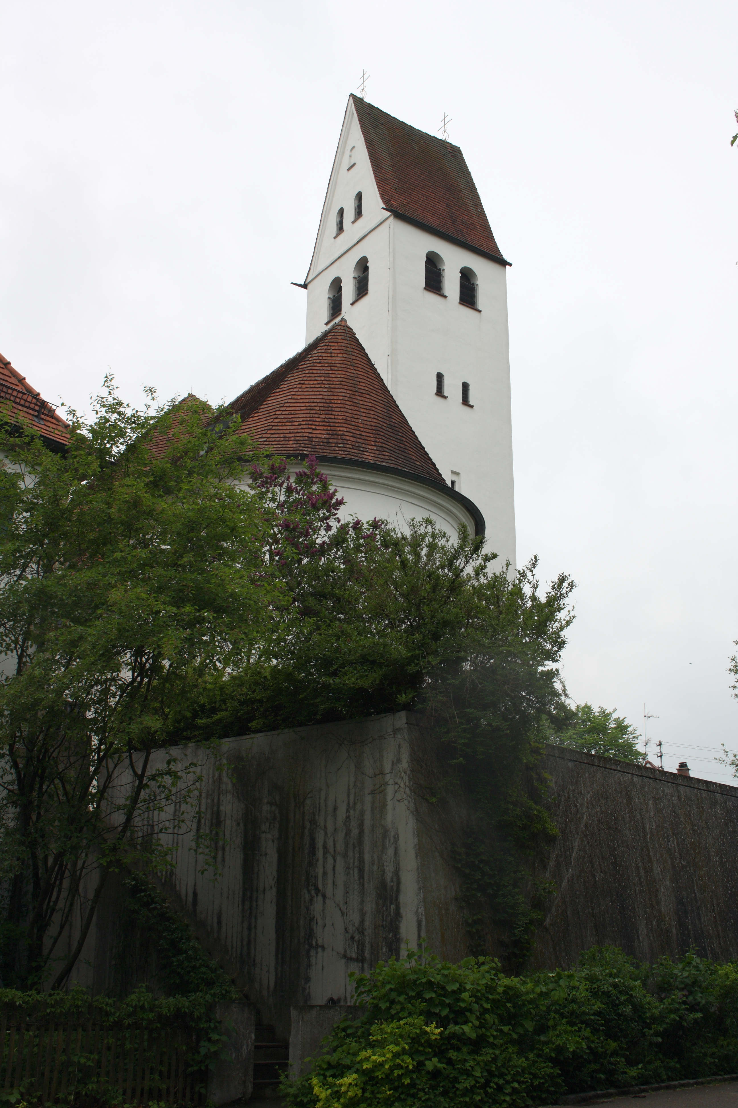 katholische Pfarrkirche St. Stephan in Altenbaindt, einem Ortsteil von Holzheim im Landkreis Dillingen an der Donau